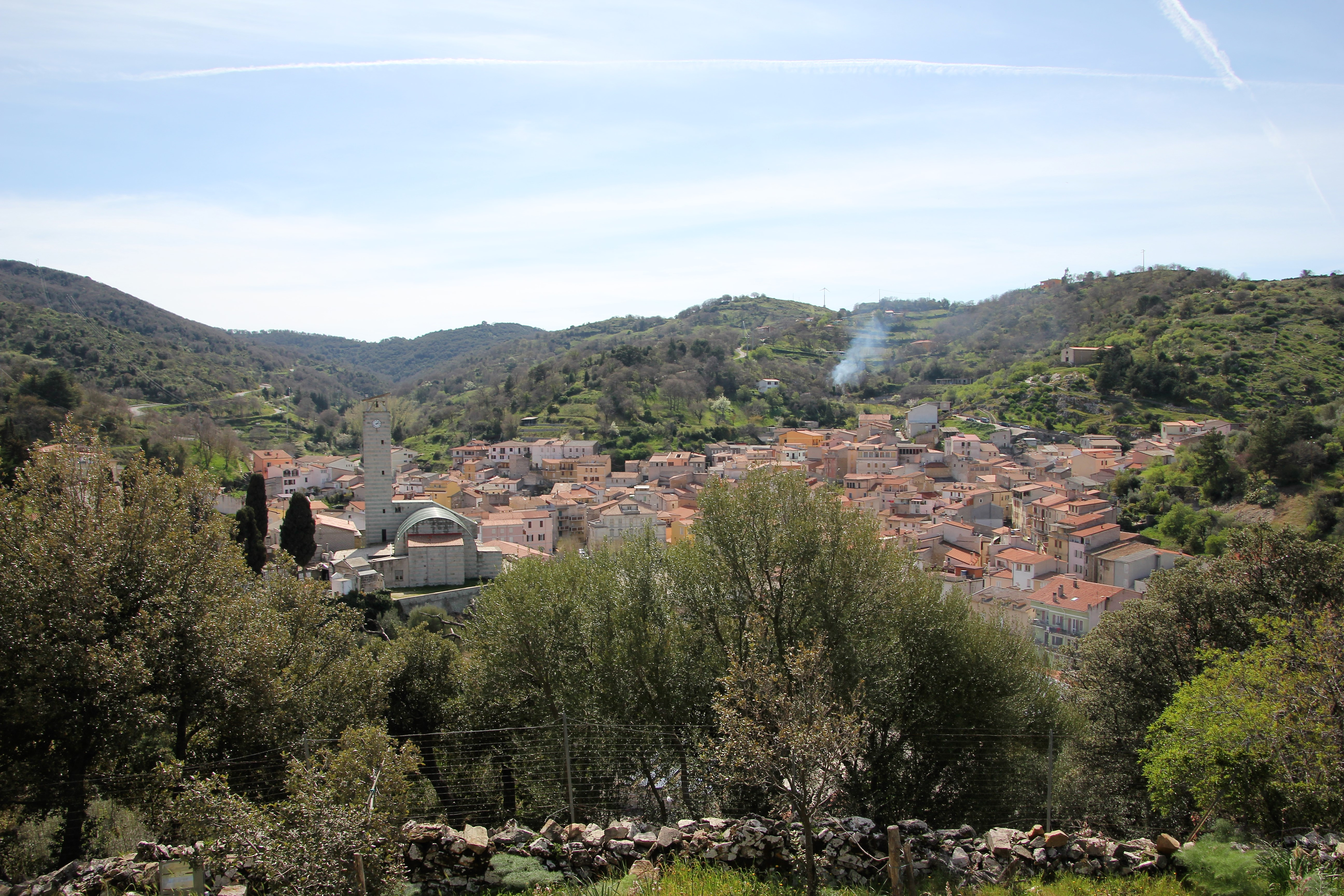 Nughedu San Nicolò, panorama